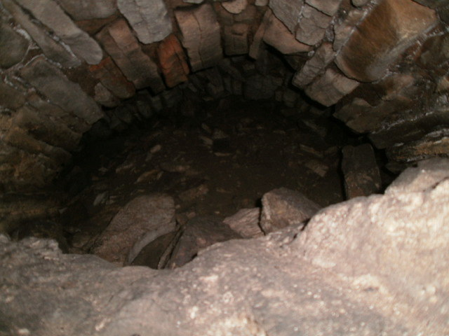 Torni keldrikorrusel olev kinnimüüritud võlvkäik jätkub ida suunas ülejäänud hoone all.